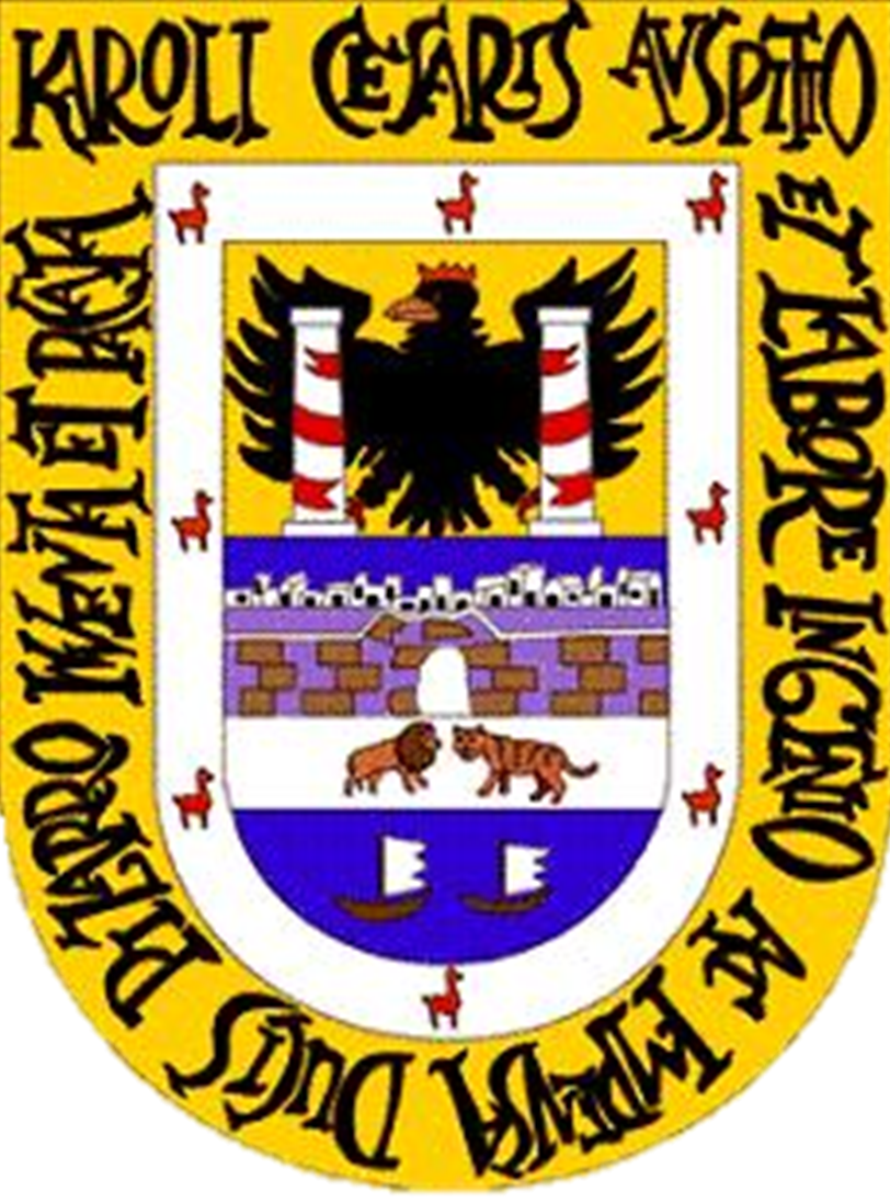 Escudo de Tumbes